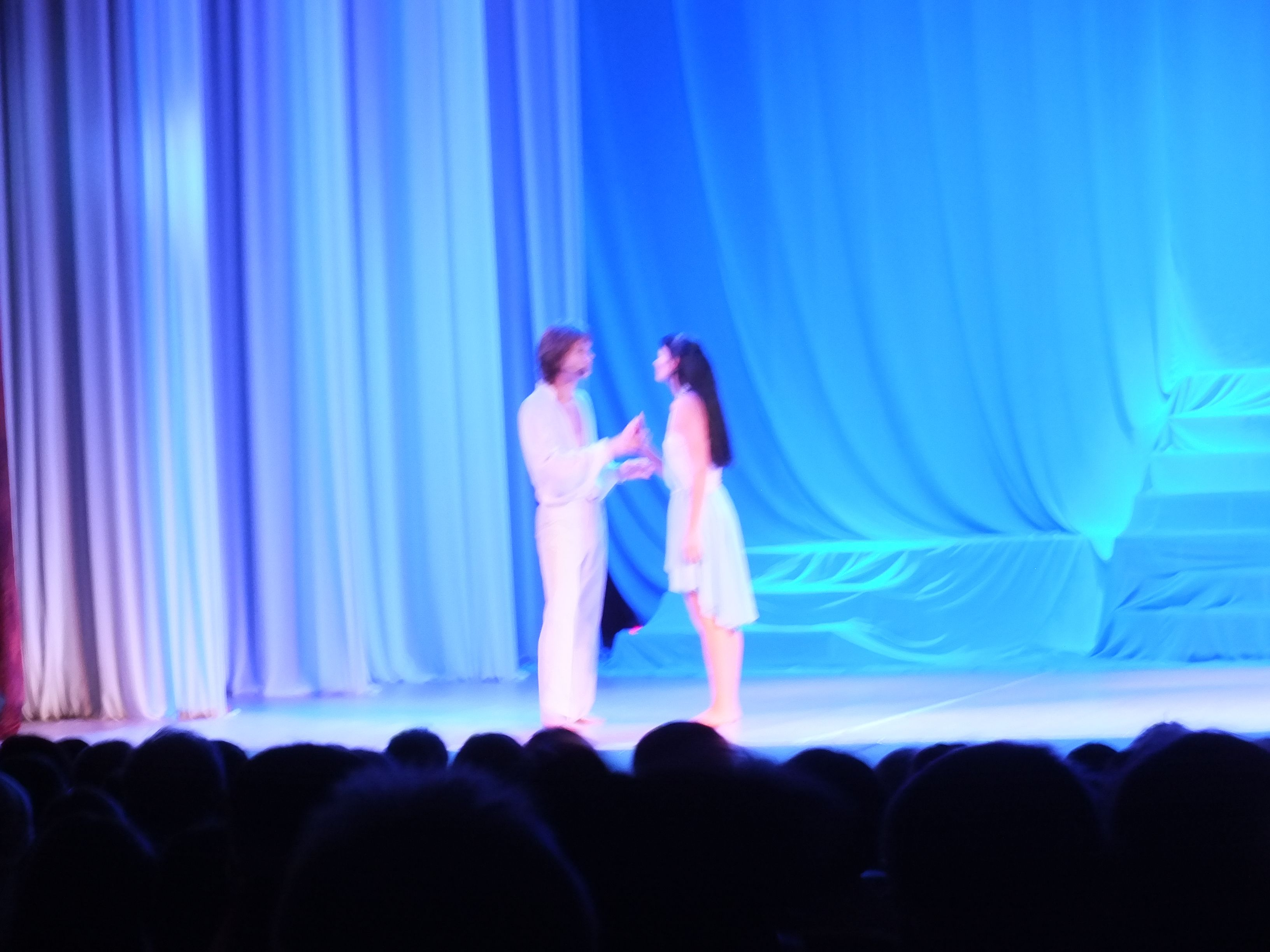 Уссурийск, Драматический театр Восточного военного округа